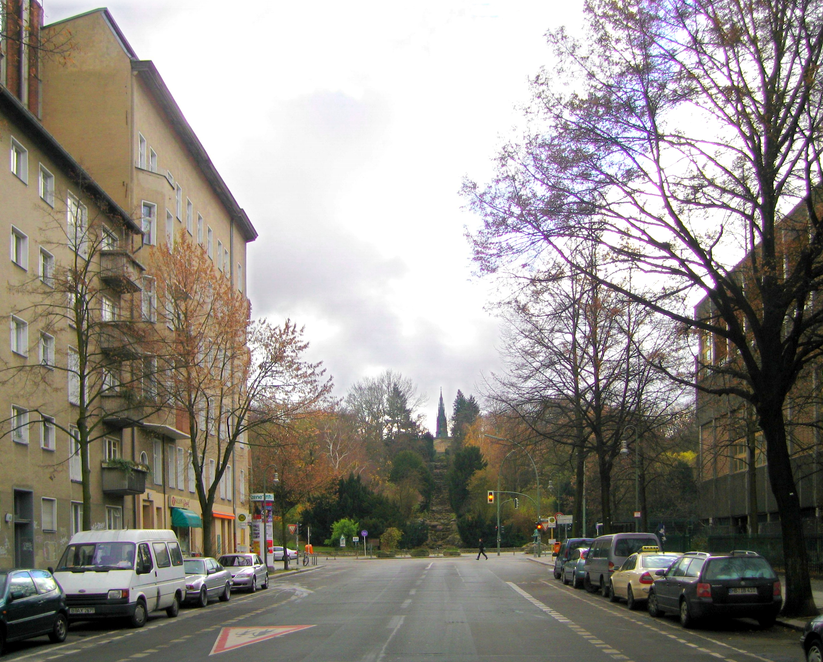 Kreuzberg and Viktoriapark, seen from Großbeerenstraße, 2007